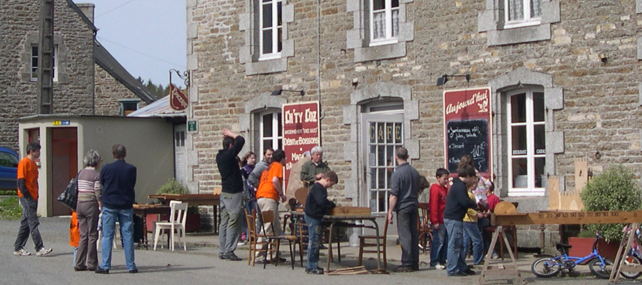 Bulad-Pestivien o prientiñ Redadeg 2008